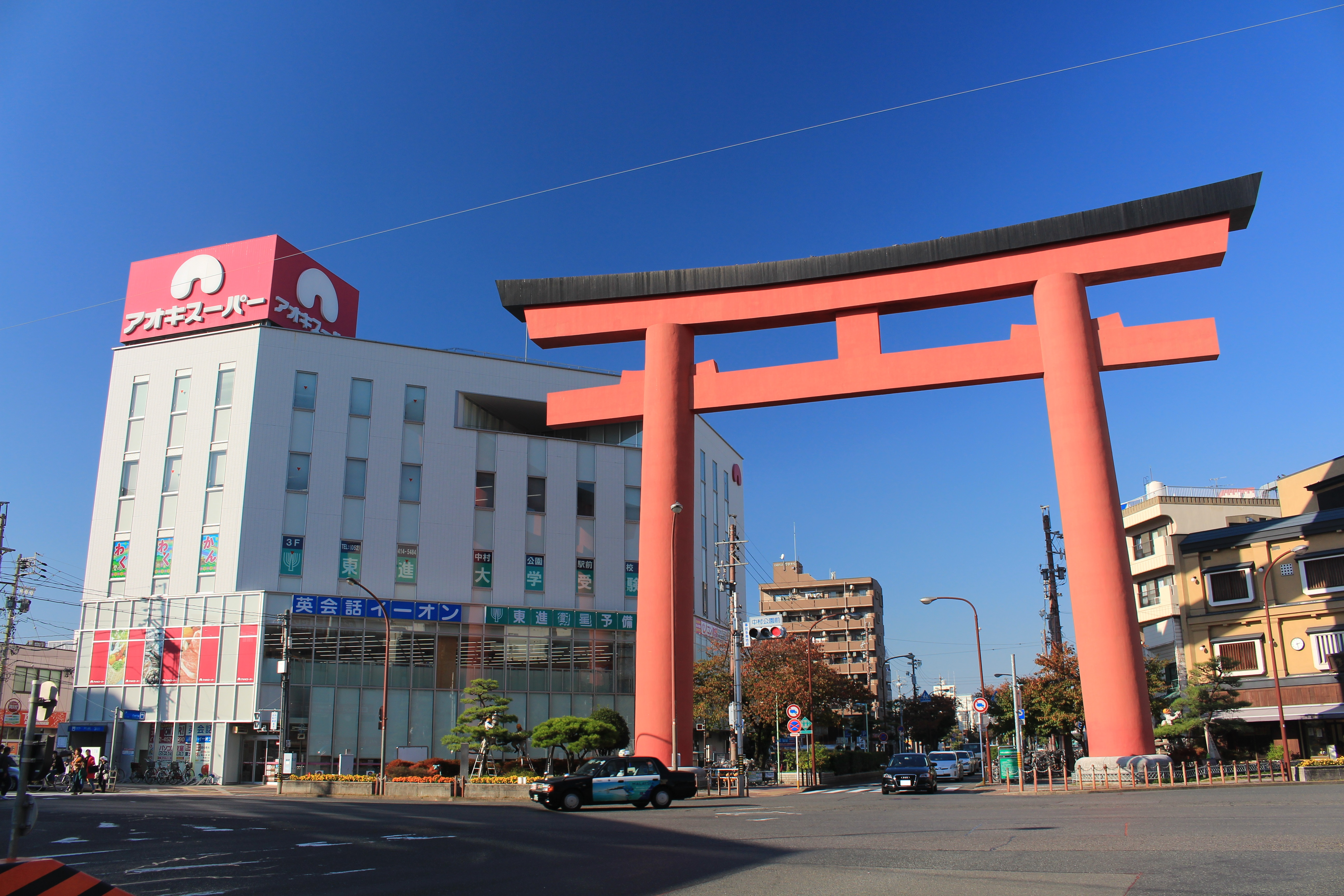 愛知県道68号名古屋津島線中村公園前交差点にあるの豊国神社の赤鳥居とアオキスーパー中村店、愛知県名古屋市中村区